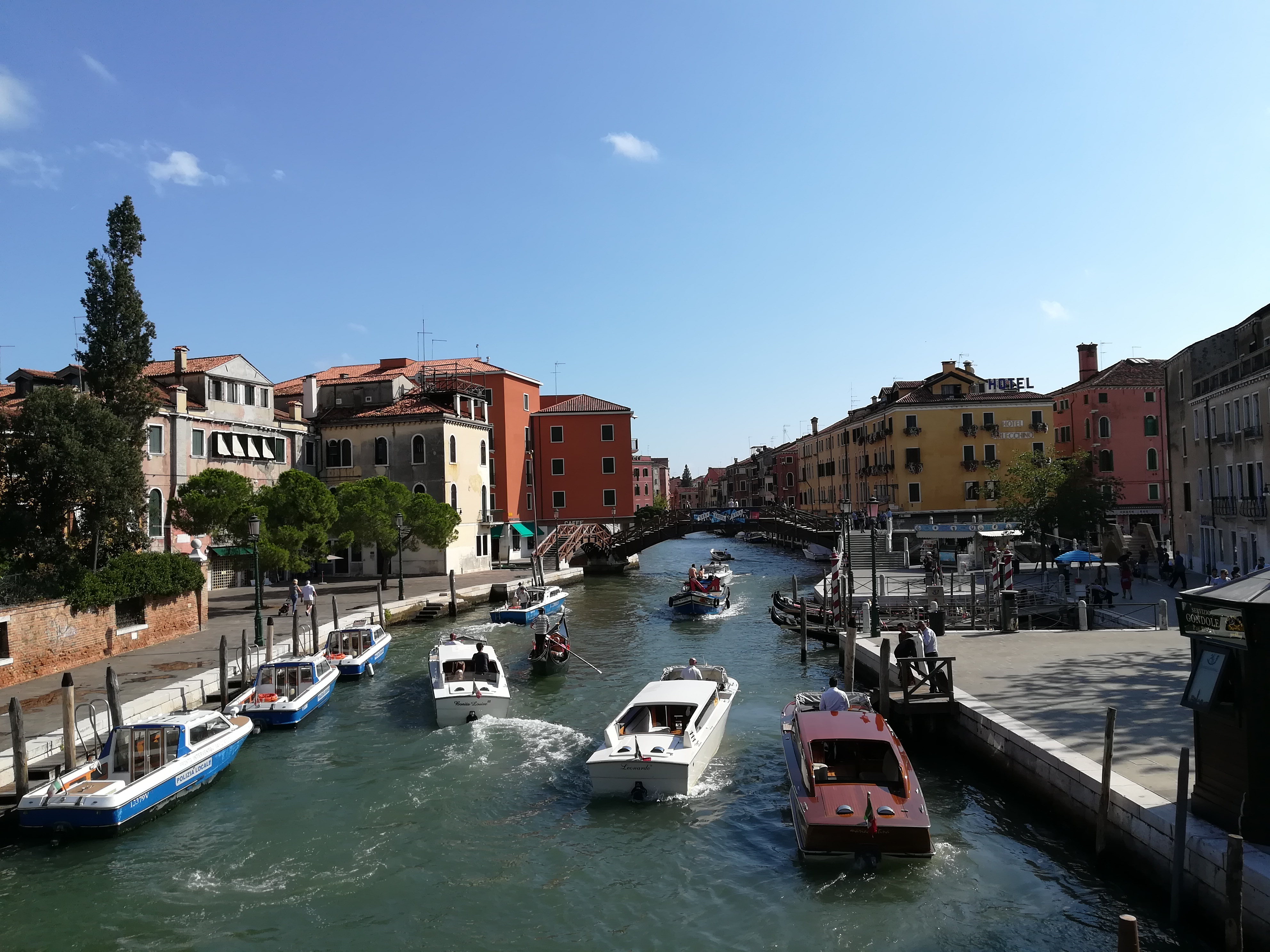 Canale veneziano.